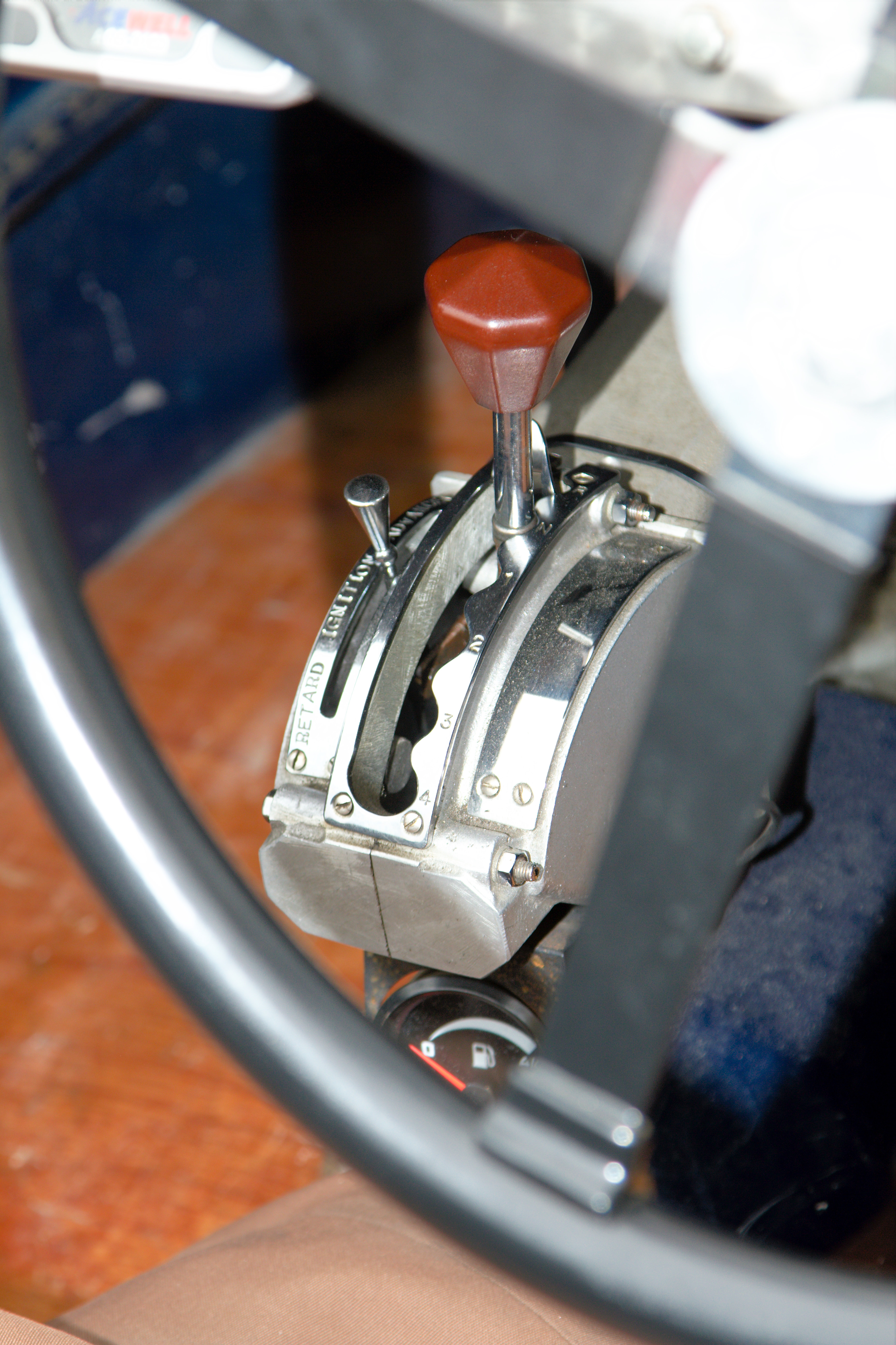 MG Magna L Supercharged 1933 Gaisbergrennen 2011